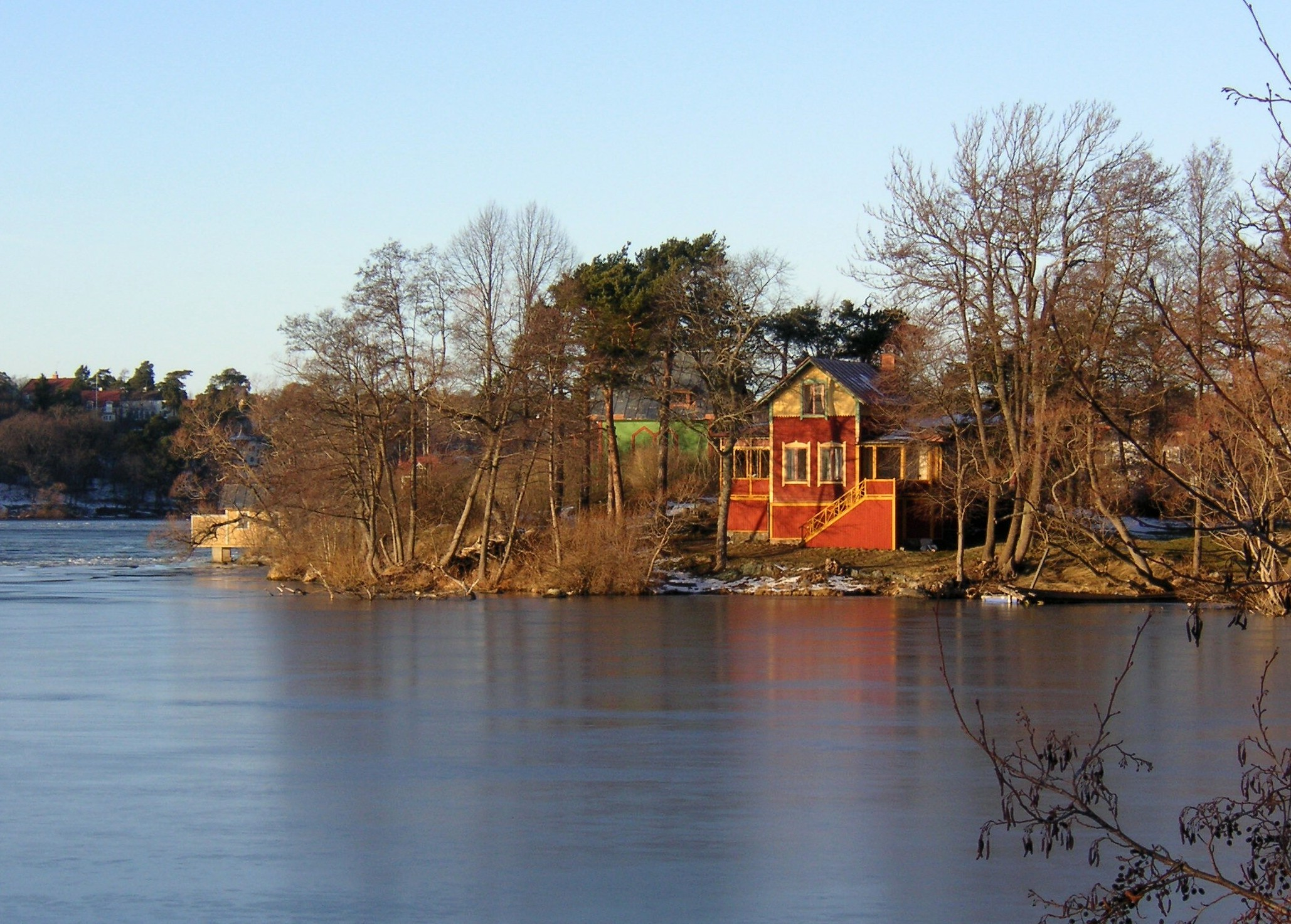 Ön "Lindholmen" i Mälaren utanför Vinterviken, Stockholm